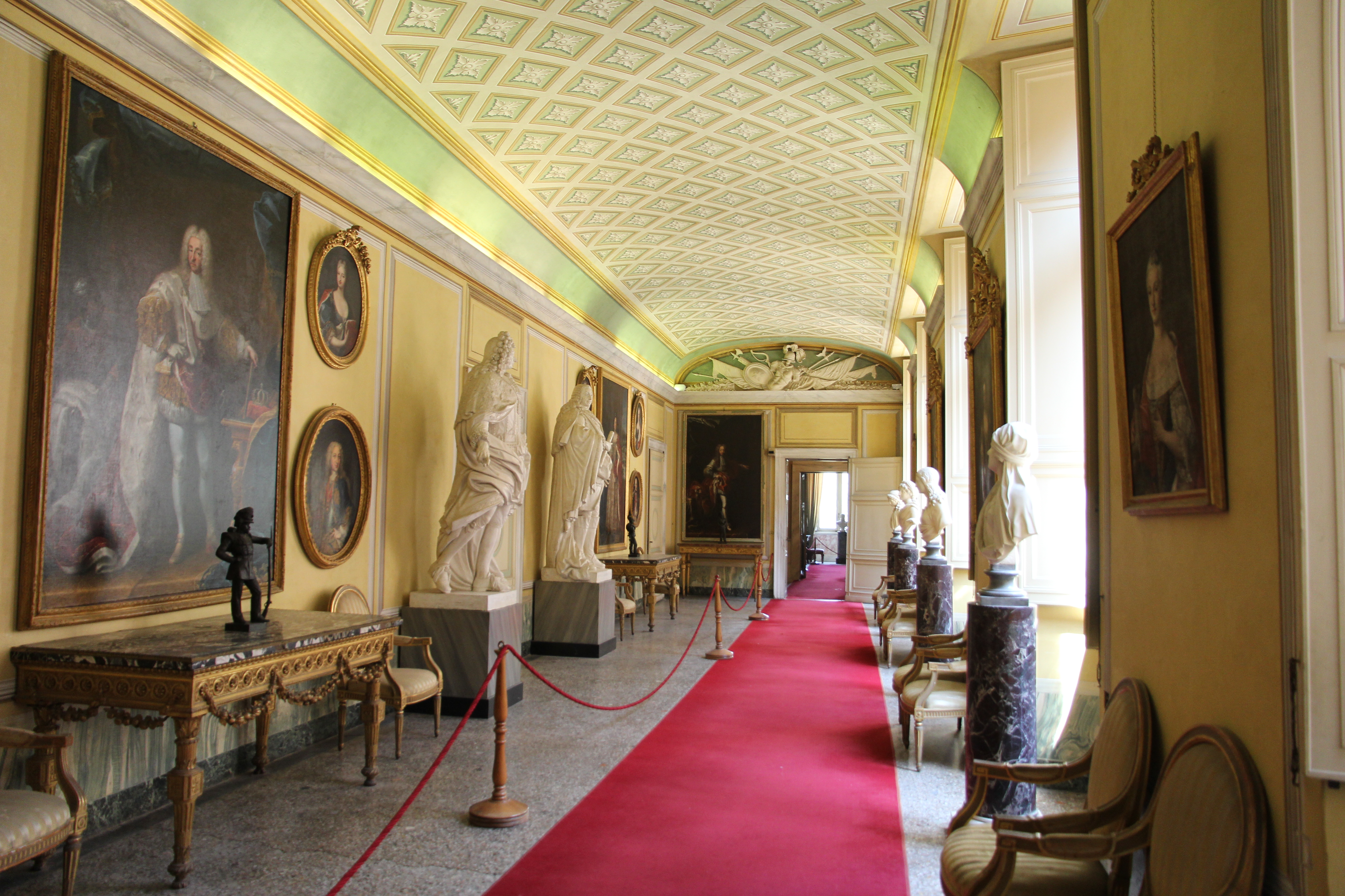 Racconigi, il castello